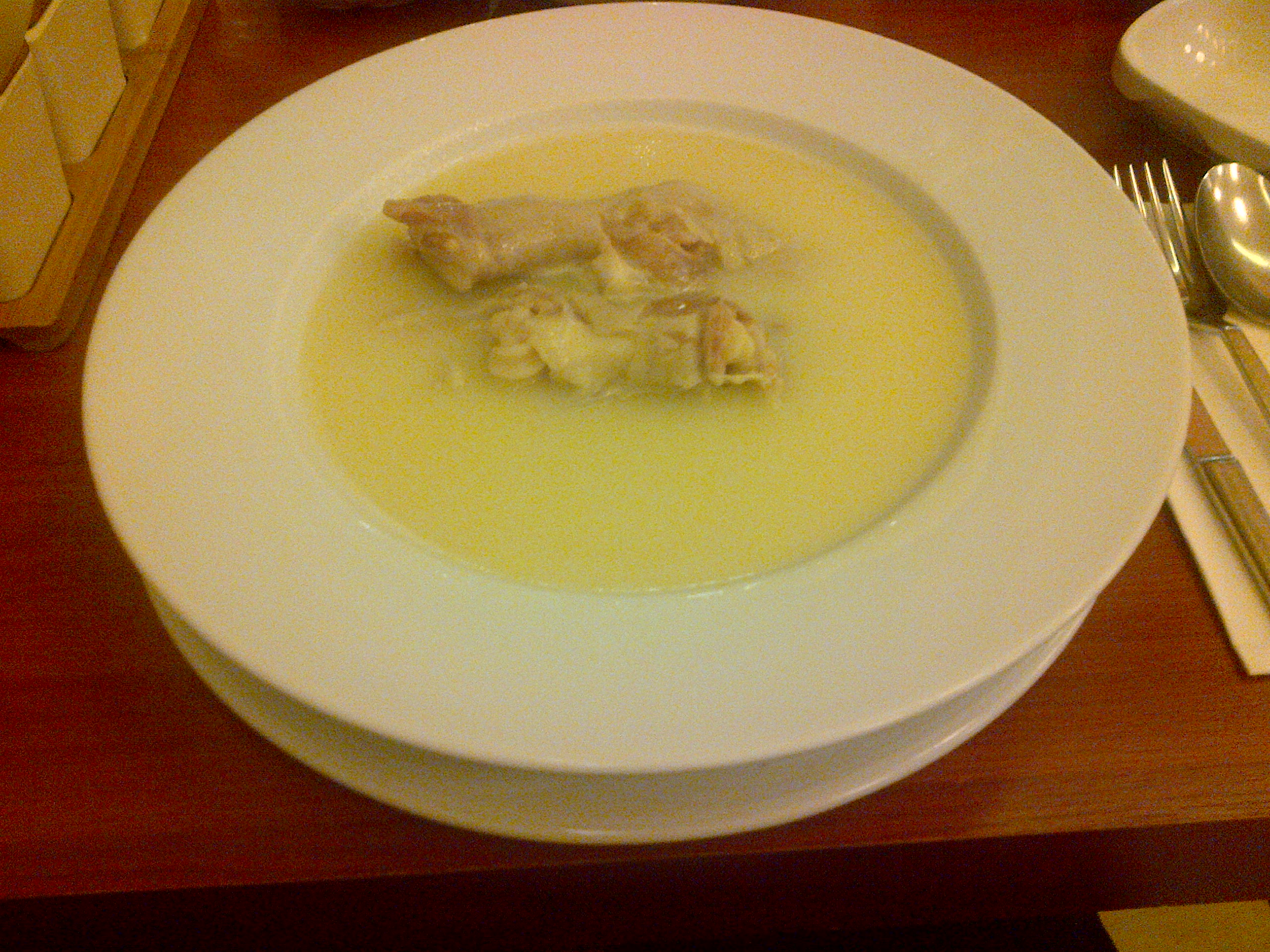 "Kuzu paça" es un guiso-sopa hecho con la pata (pezuna) de cordero o mas bien oveja.